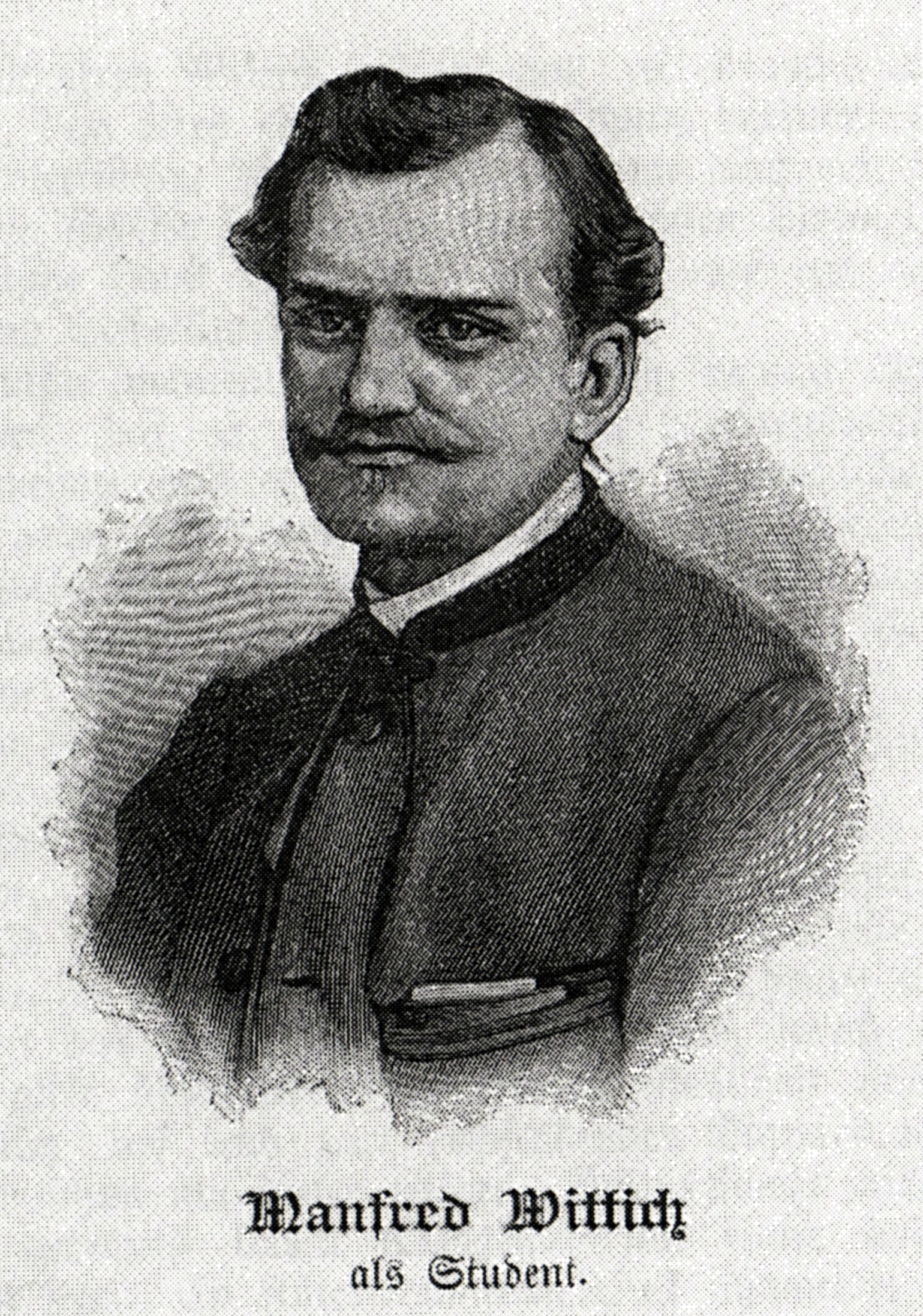 Bild des Schriftstellers Manfred Wittich